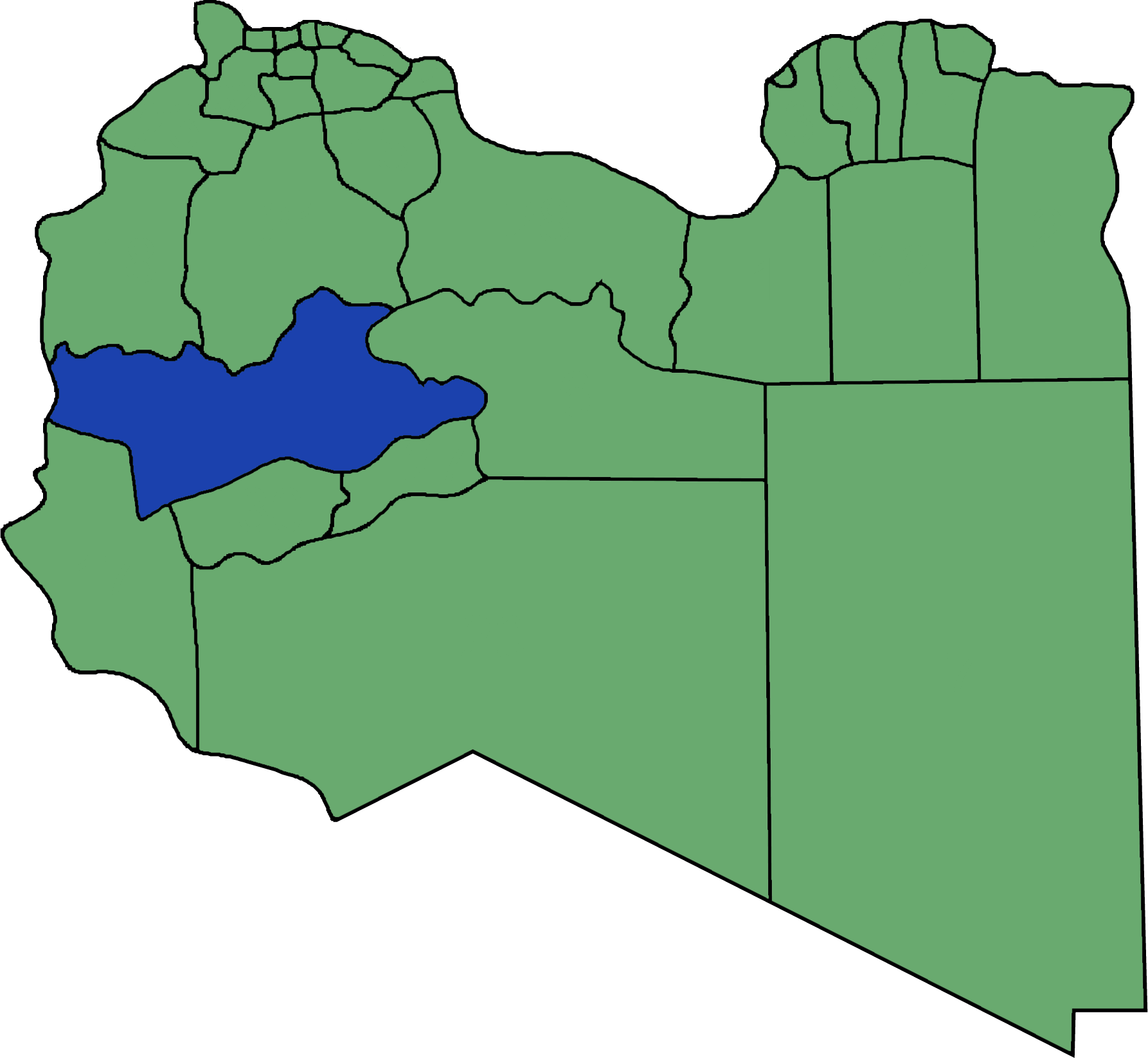 Die neuen Gemeinden (Munizipien) in Libyen. Wadi Al Shatii hervorgehoben.